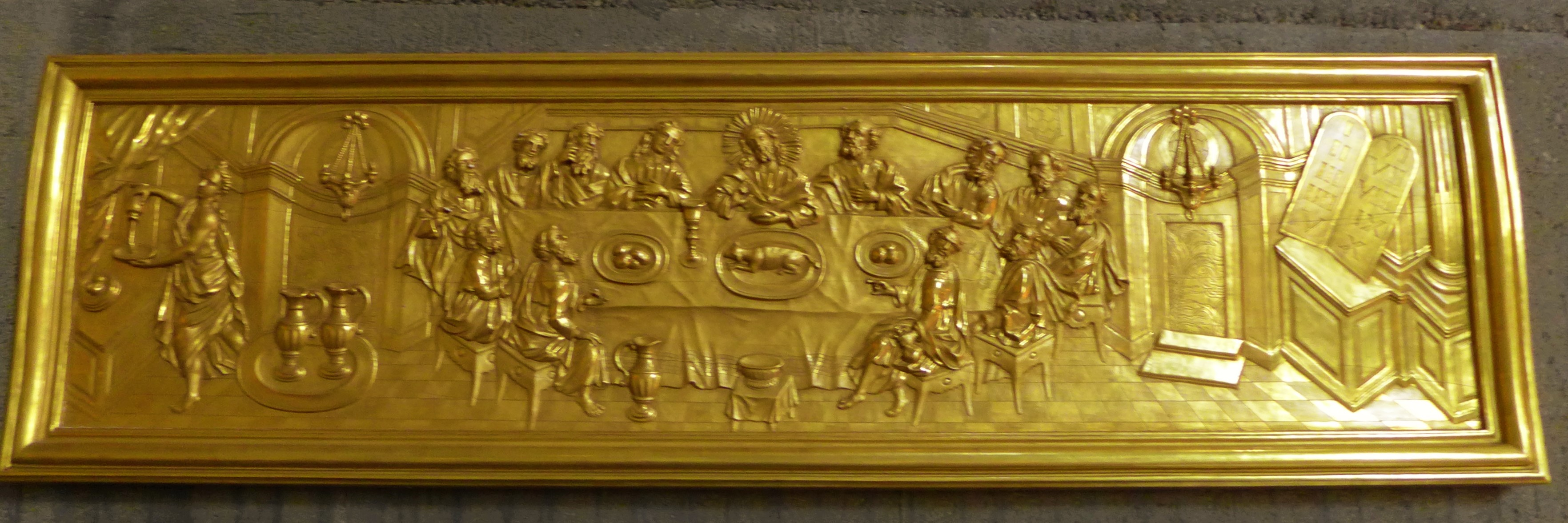 St. Ludwig (Saarlouis), Antependium mit Abendmahlsszene